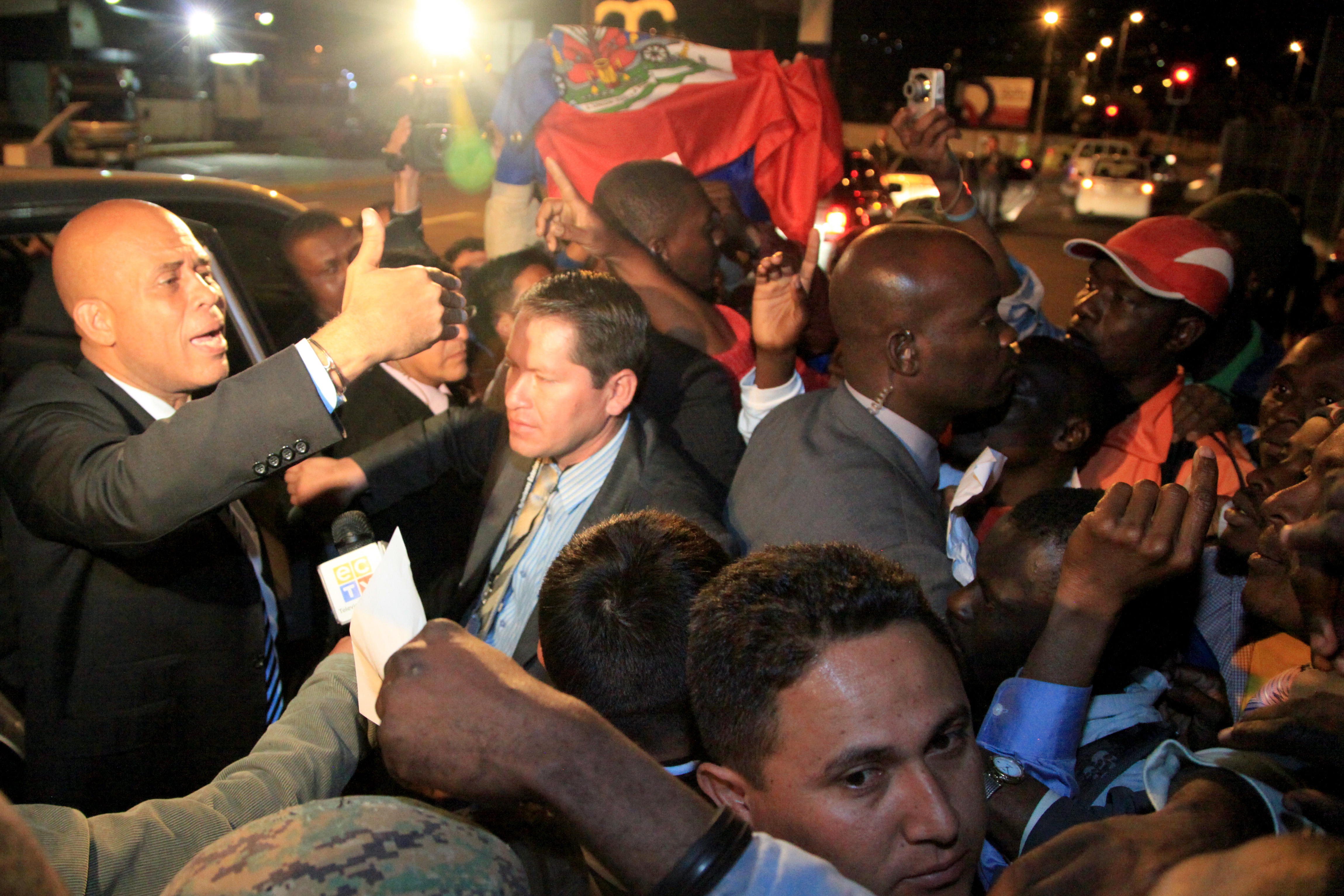 Quito (Ecuador), 10 de Julio 2012. El Viceministro de Relaciones Exteriores Dr. Marco Albuja recibió al Presidente de Haití Michel Martelly. Foto: Xavier Granja Cedeño - Ministerio de Relaciones Exteriores, Comercio e Integración.